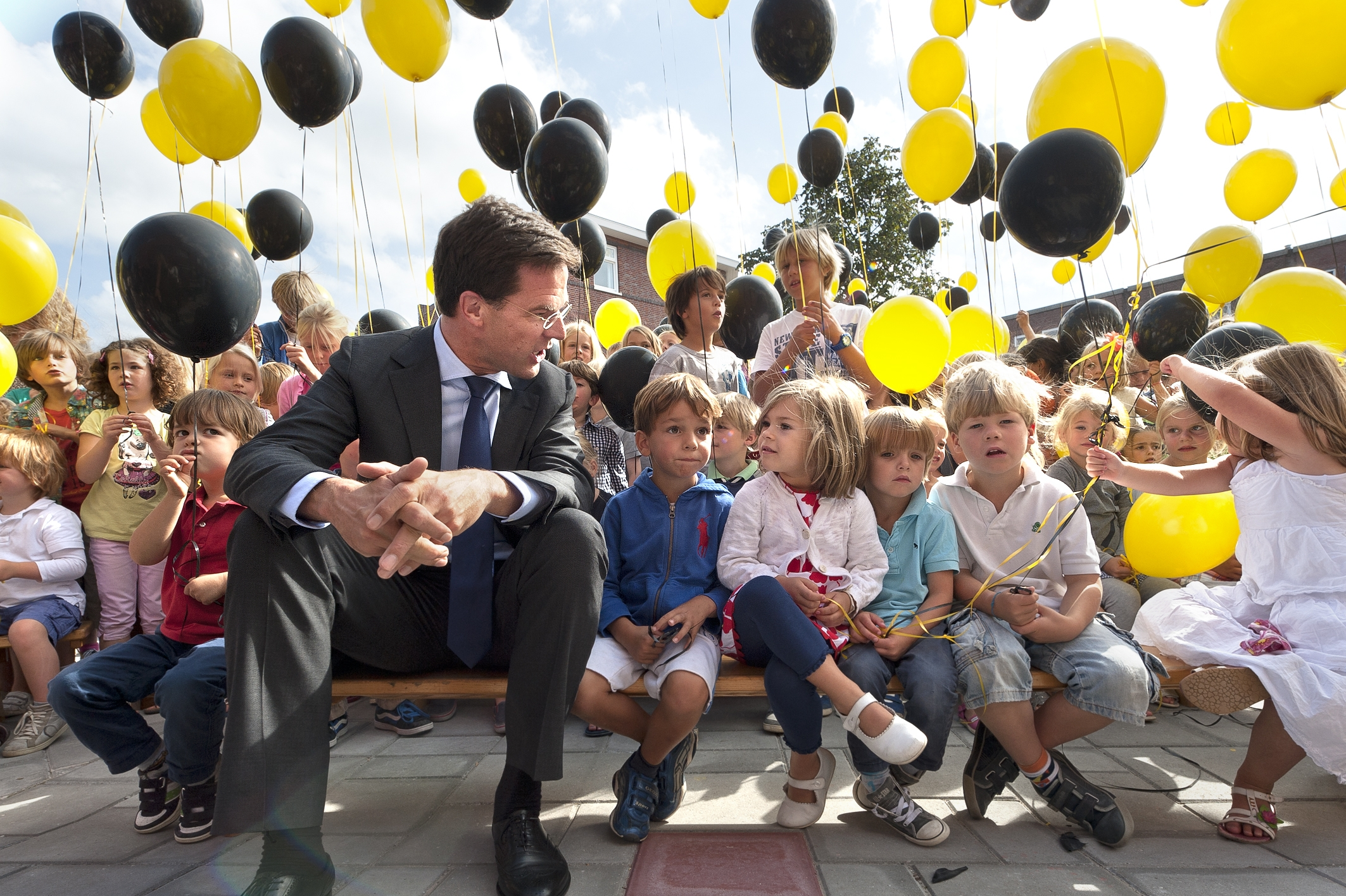 Minister-president Rutte opent de nieuwbouw van zijn oude basisschool Schoolvereniging Wolters. Sinds 1939 is de school gevestigd aan de Utenbroekestraat in Den Haag. Na een verbouwing van ruim anderhalf jaar verhuizen een kleine 500 leerlingen met hun leraren weer terug naar deze locatie.